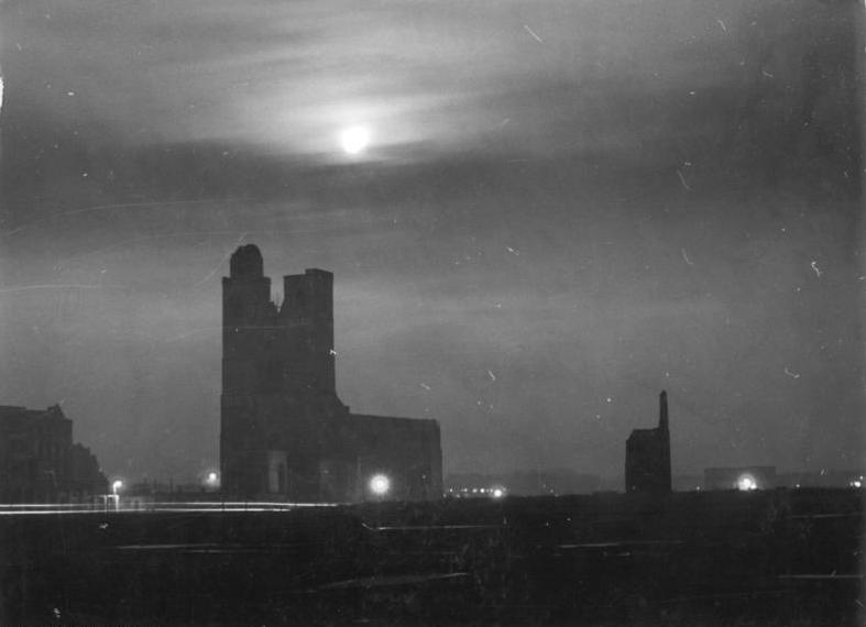 Zentralbild-Biscan Kno-Ho. 11.11.1952 Magdeburg bei Nacht Das bereits völlig enttrümmerte Stadtviertel zwischen dem Breiten Weg und der Johanniskirche. Nur die Reste einer Giebelwand (neben der Kirche) blieben stehen, weil es die Reste eines der ältesten Magdeburger Hauses sind und historischen Wert haben. Der freie Platz wird das Zentrum des neuen Magdeburgs. Rechts wird sich in einigen Jahren der Neubau des Rathauses befinden.